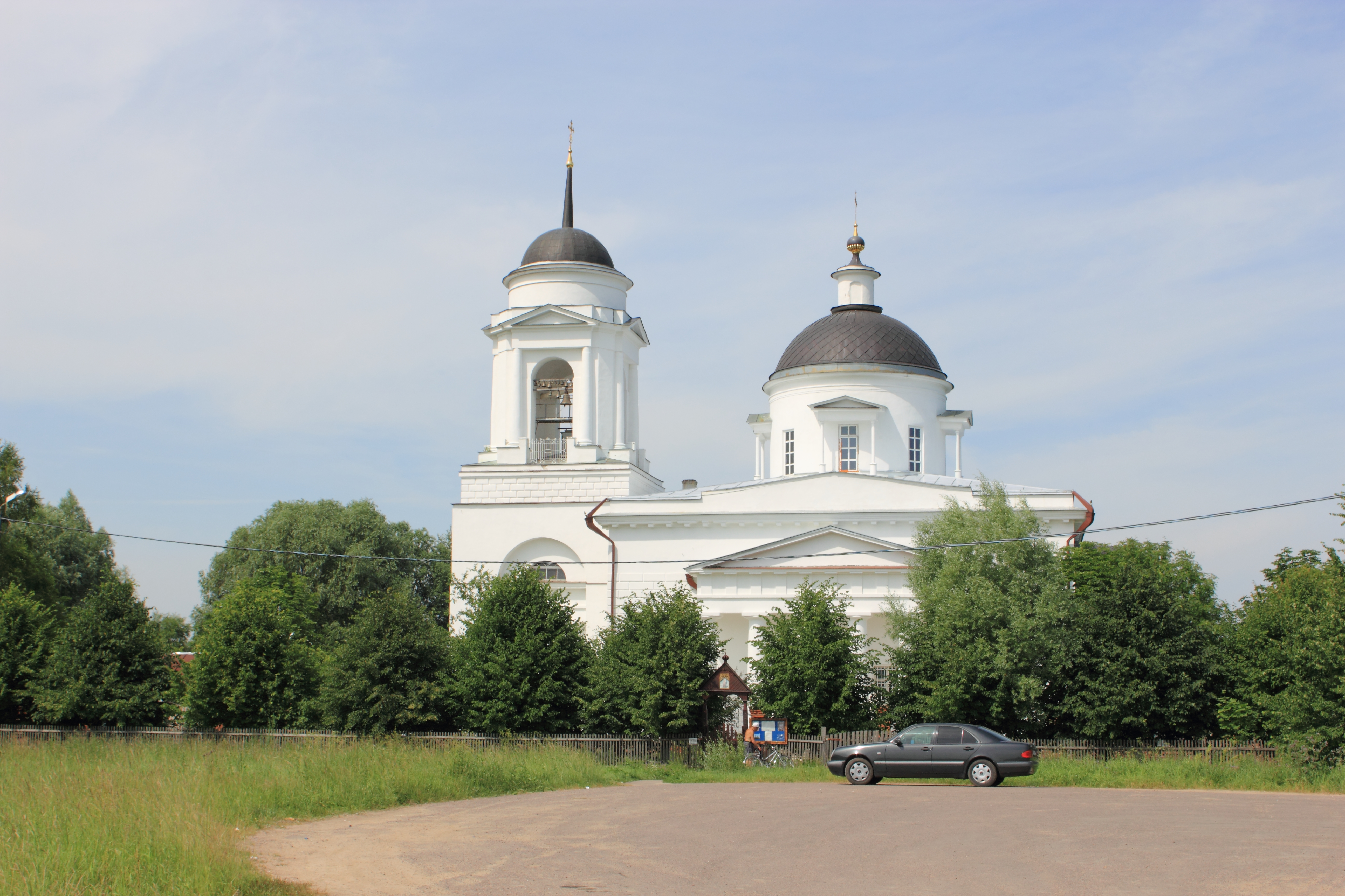 Михайло-Архангельская церковь, село Михайловское Домодедовского городского округа Московской области.